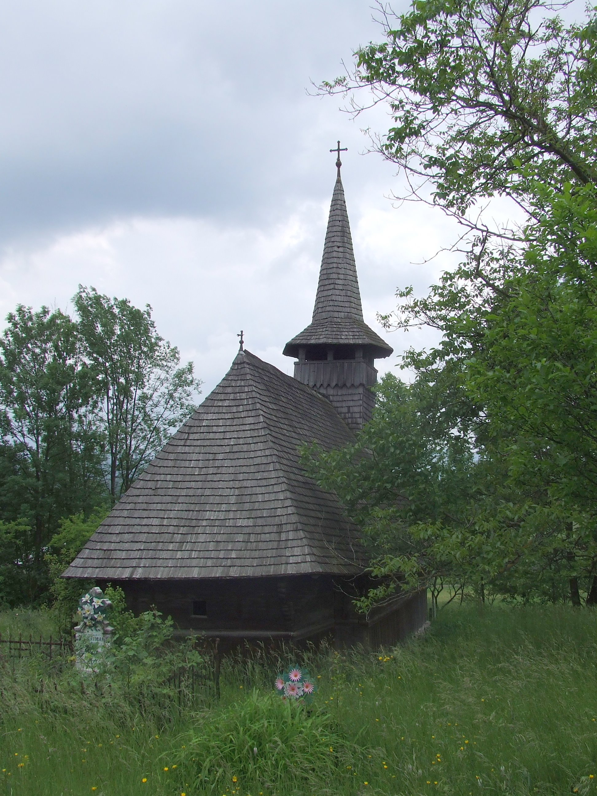 Biserica de lemn din Valea Crişului, judeţul Bihor. Vedere de ansamblu.